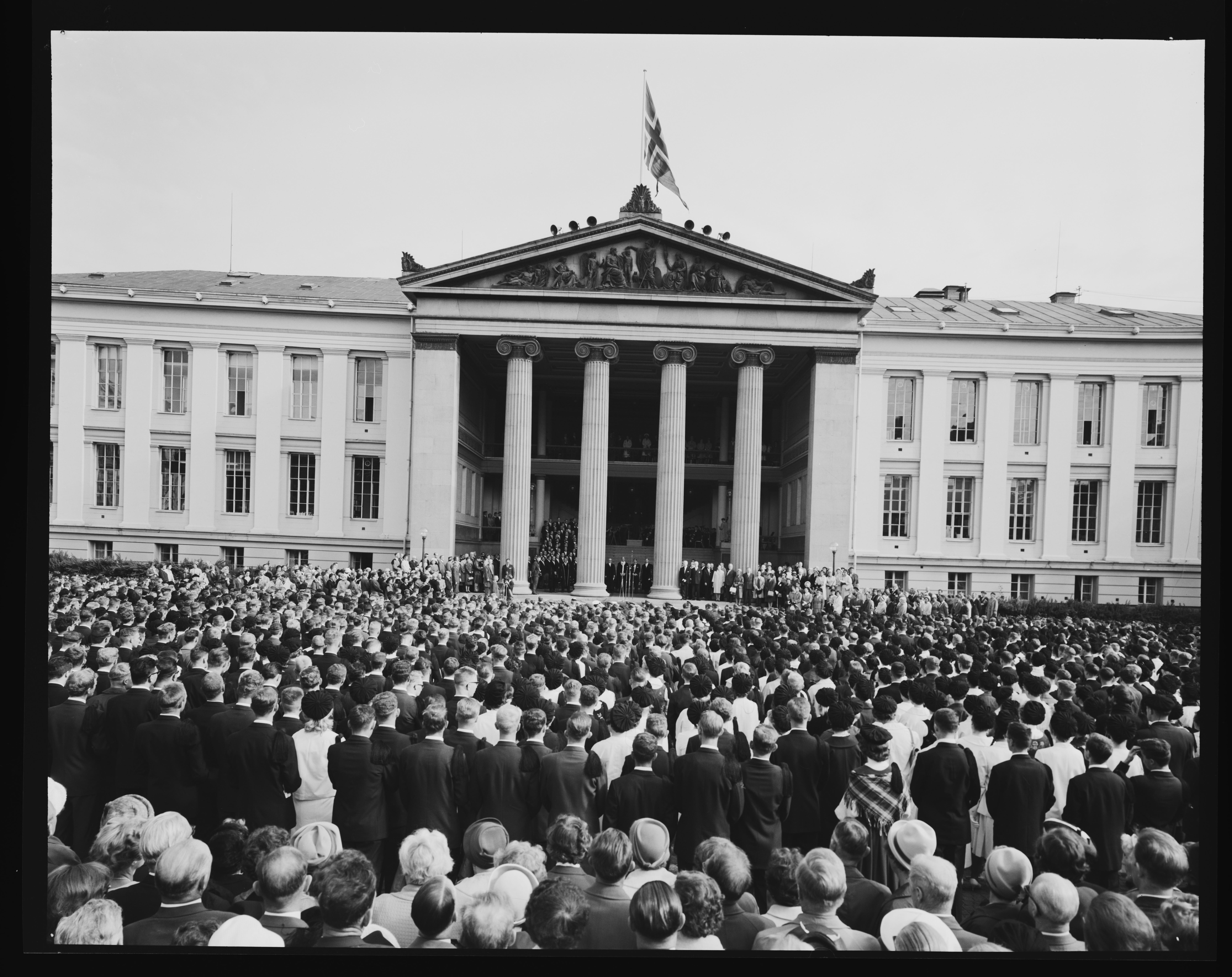 Bildet er hentet fra Nasjonalbibliotekets bildesamling Oslo,Universitetsplassen, Oslo, Oslo